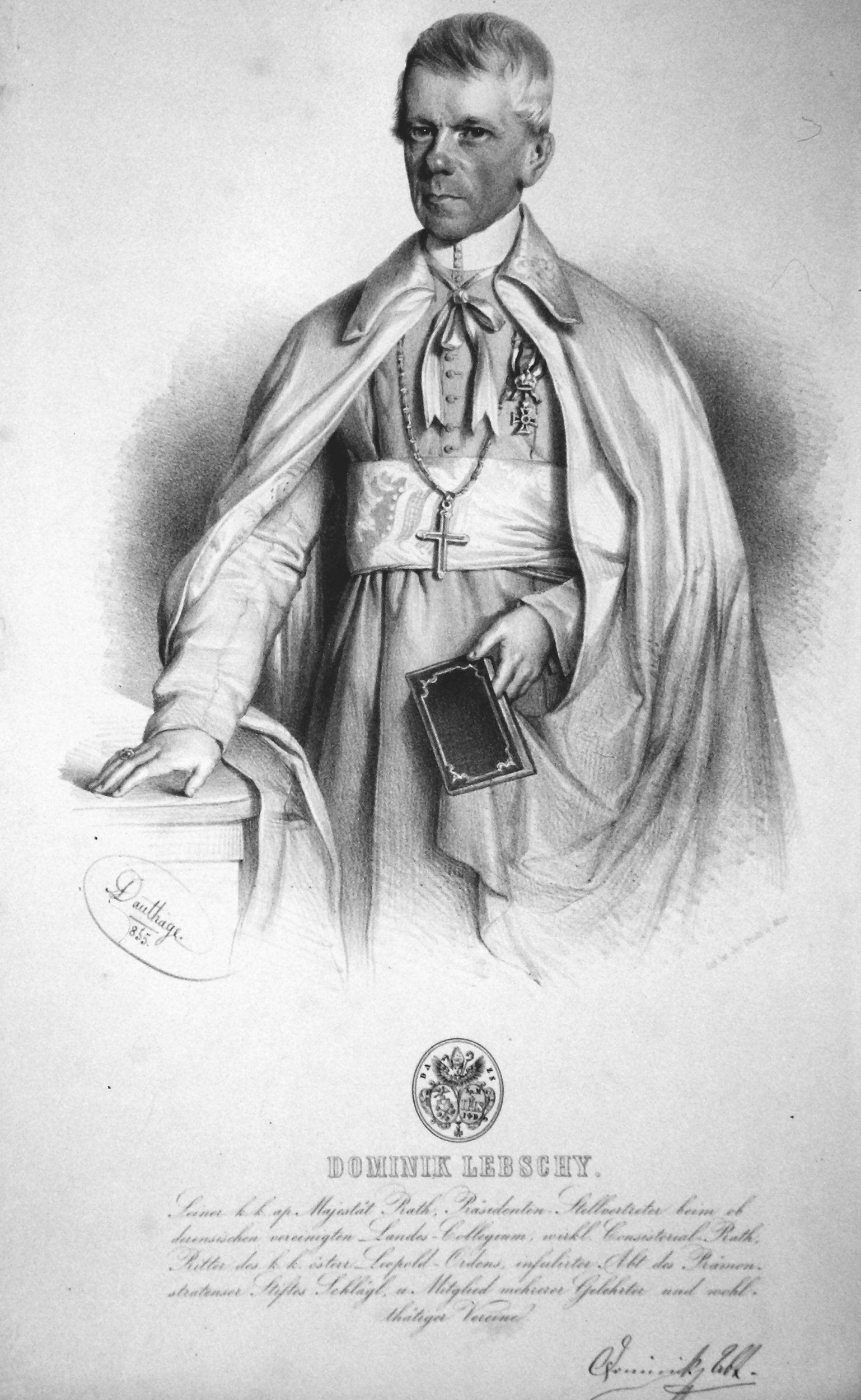 Dominik Lebschy (1799-1884), Abt des Prämonstratenser-Stifts Schlägl. Erster Landeshauptmann von Österreich ob der Enns. Lithographie von Adolf Dauthage, 1855